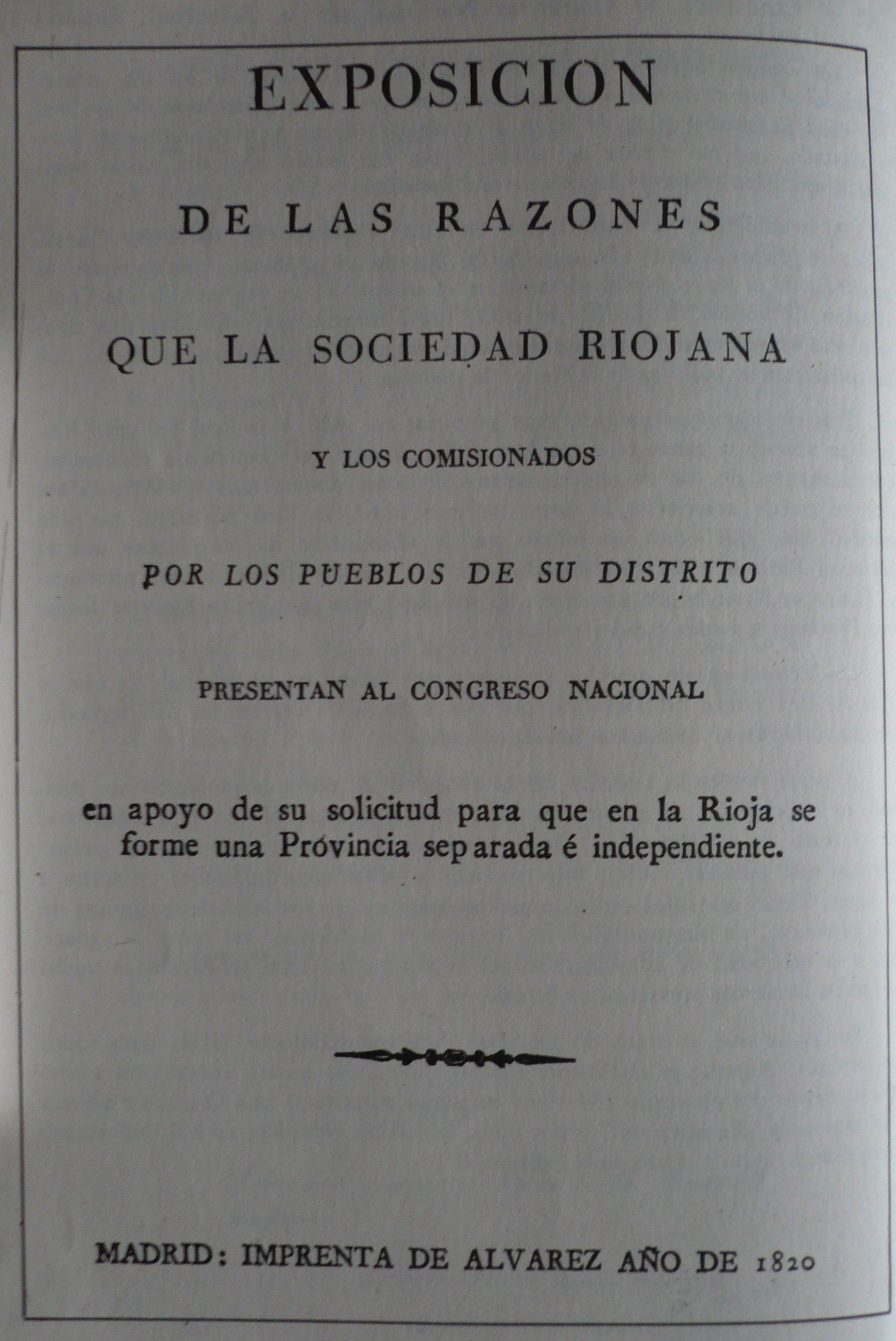 Portada del documento enviado por la Sociedad Riojana de amigos del país al congreso nacional con el objetivo de que a La Rioja se la dotara de un marco administrativo provincial. Este documento se envia en el año 1820, momento en el cual se estaba organizando una futura división provincial en España que finalemente vería la luz en el año 1822. En el caso de La Rioja las reclamaciones tuvieron éxito y la región se constituyó en provincia aunque bajo la denominación de provincia de Logroño, debido al acuerdo por el cual la mayoría de ellas debían llevar los nombres de sus capitales.